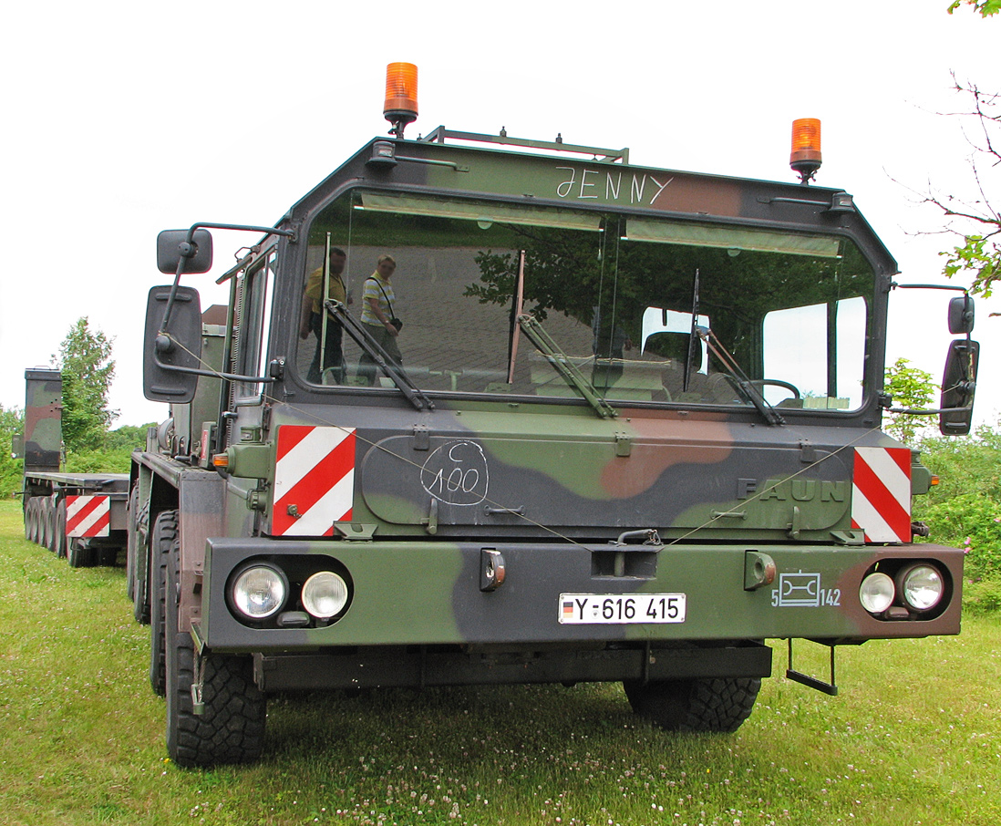 Dieses Bild zeigt einen Schwerlasttransporter SLT Franziska, verantwortlich für den Transport eines Leopard 2A6.